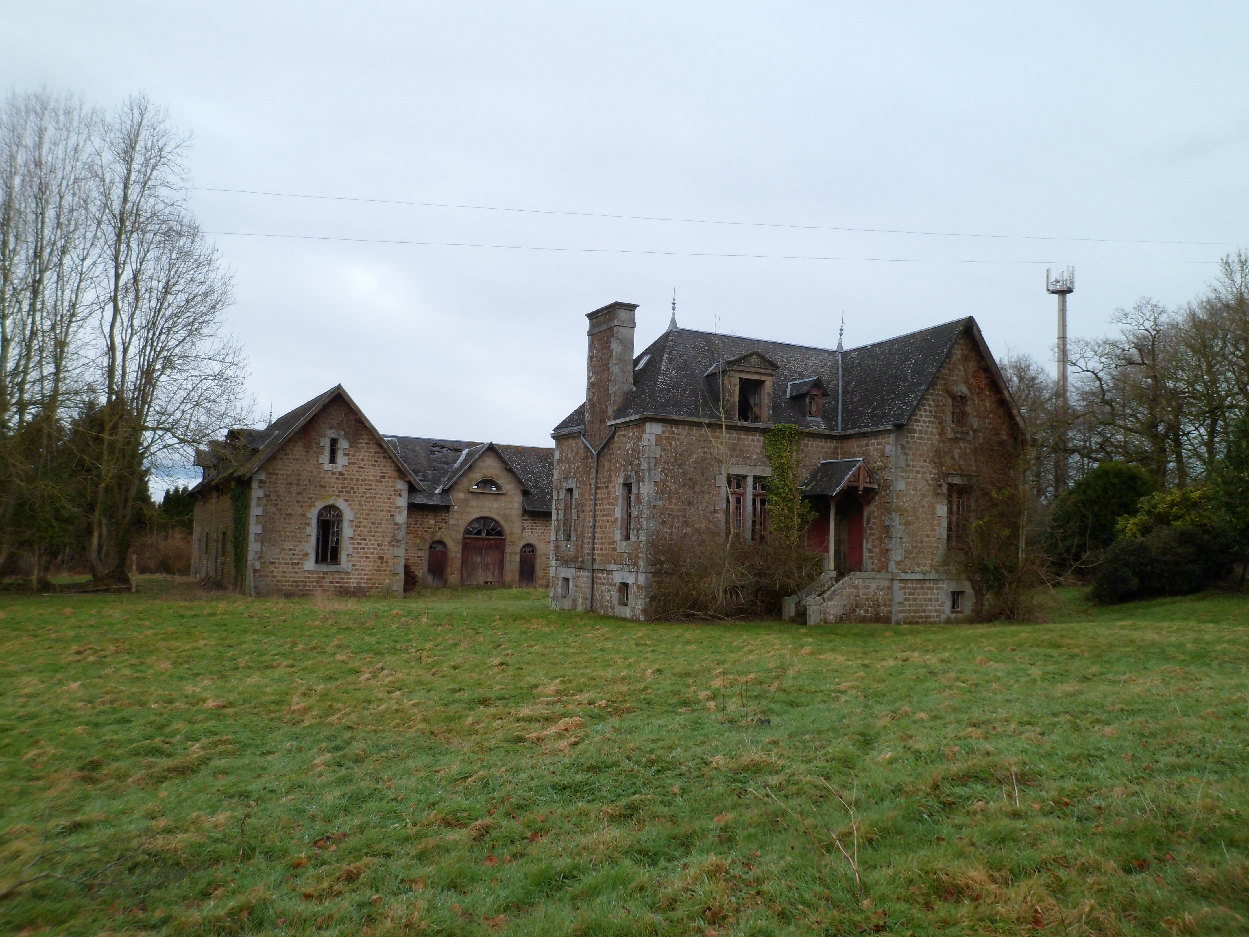 Basse-Cour face à l'ancien château de Saint-Symphorien